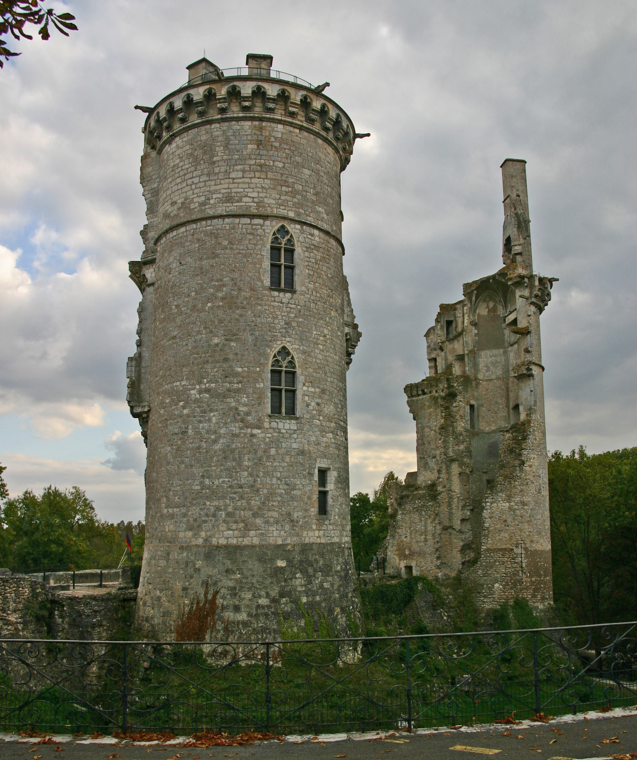 Schlossruine Mehun-sur-Yèvre